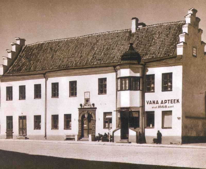 Rüütli 18 Narva vana apteek